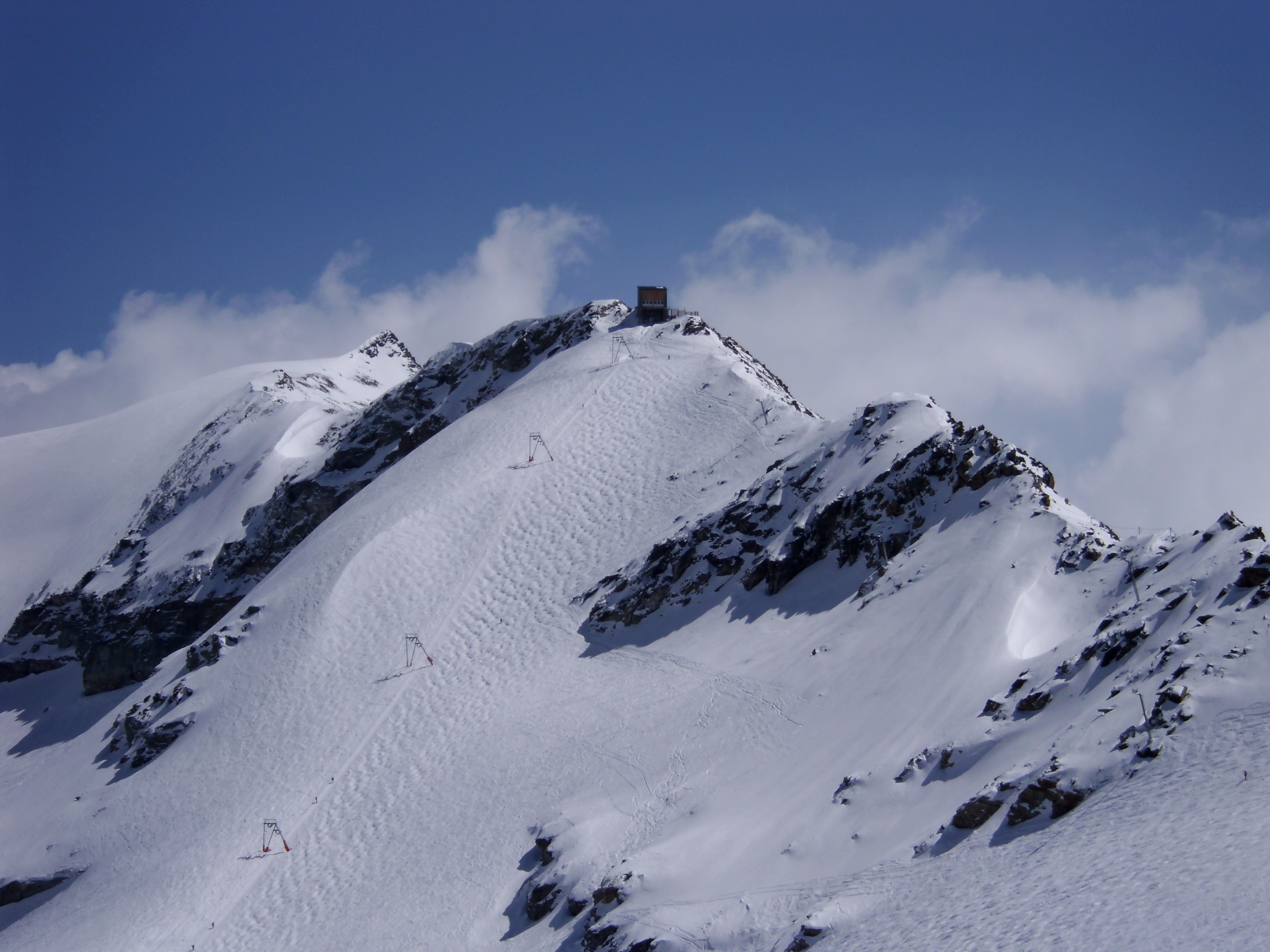 Lo Stockhorn, Svizzera